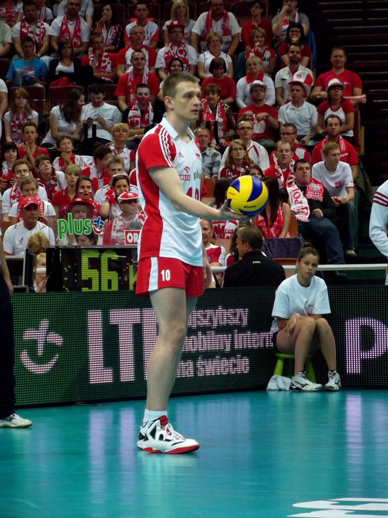 Zdjęcie zrobione podczas zawodów Ligi Światowej 2012 w katowickim Spodku.